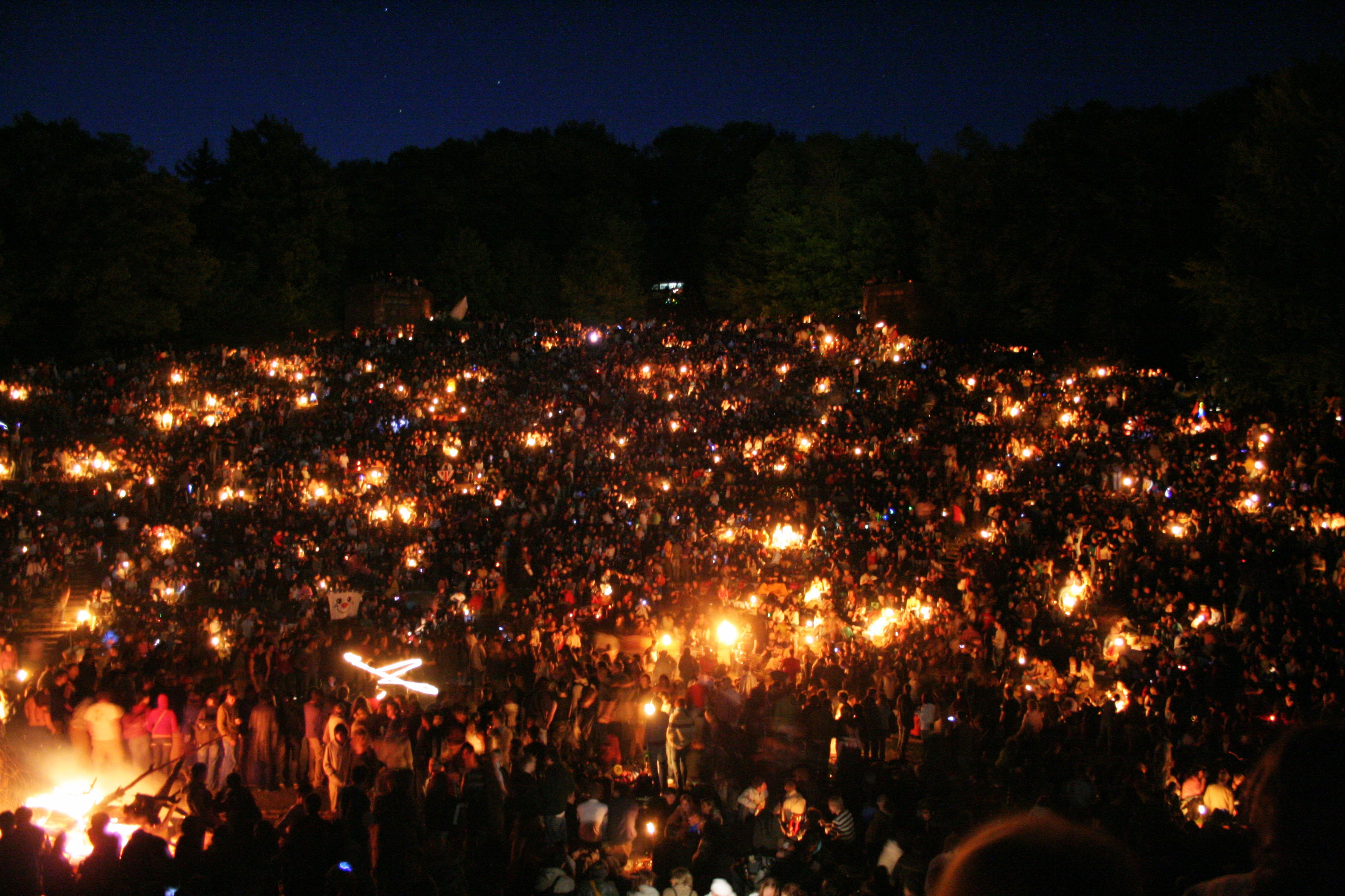 Menschenmenge beim Tanz in den Mai 2007 auf der Heidelberger Thingstätte - Nr. 001 Crowd at "Dance into the May" 2007 on Heidelberg Thingstätte - No. 001